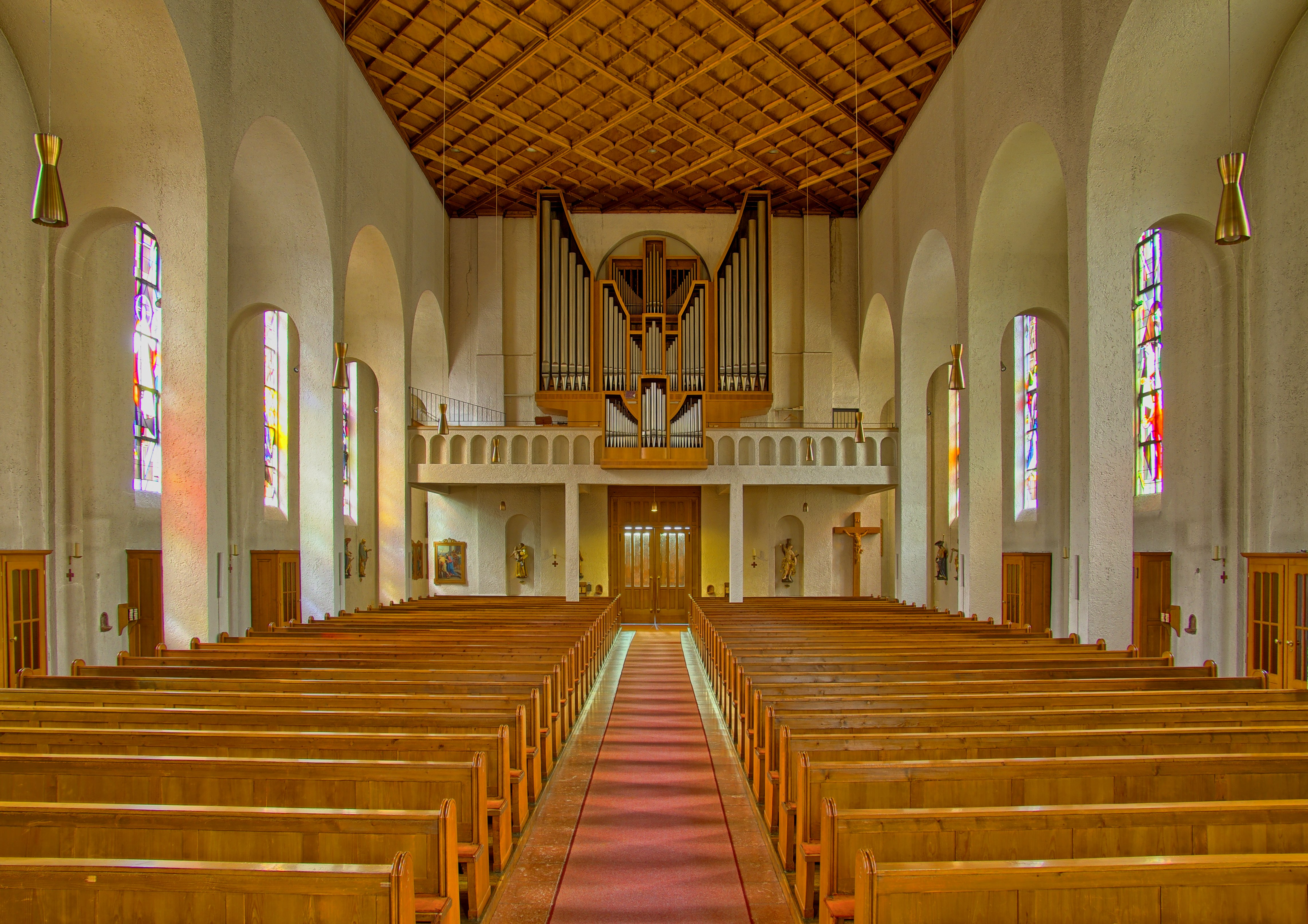 Die Pfarrkirche St. Martin in Vöhrenbach